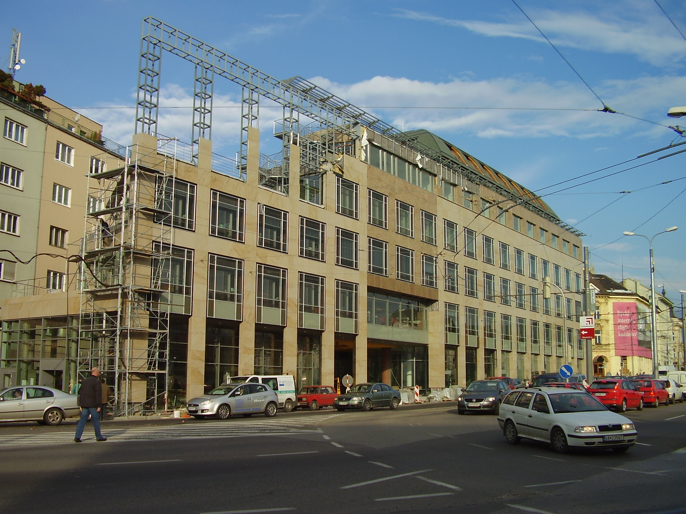 Astoria Palace at Hodžovo námestie in Bratislava